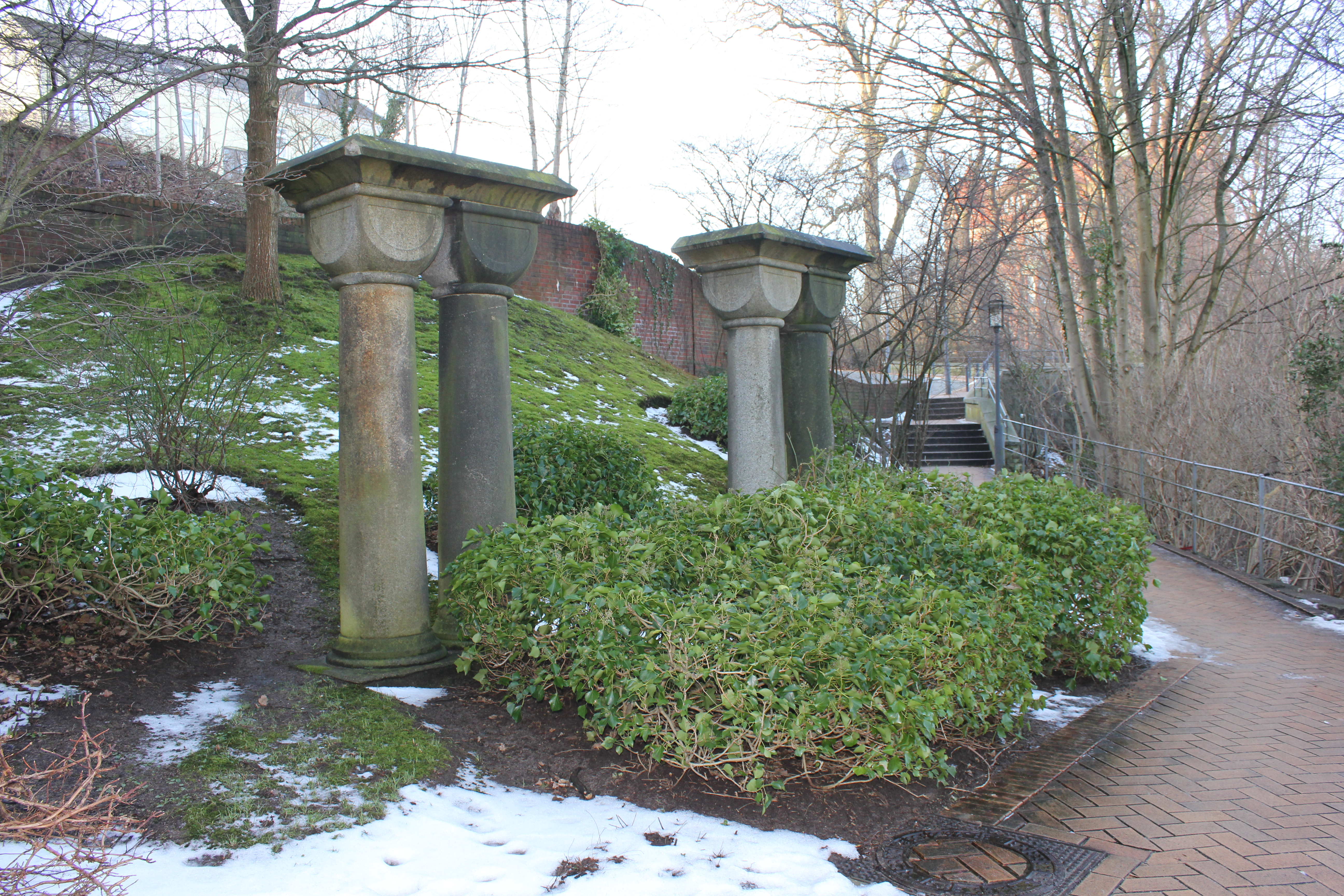 Neuromanische Säulen, Höhere Mädchenschule später Realschule West (Flensburg 2014), Bild 04